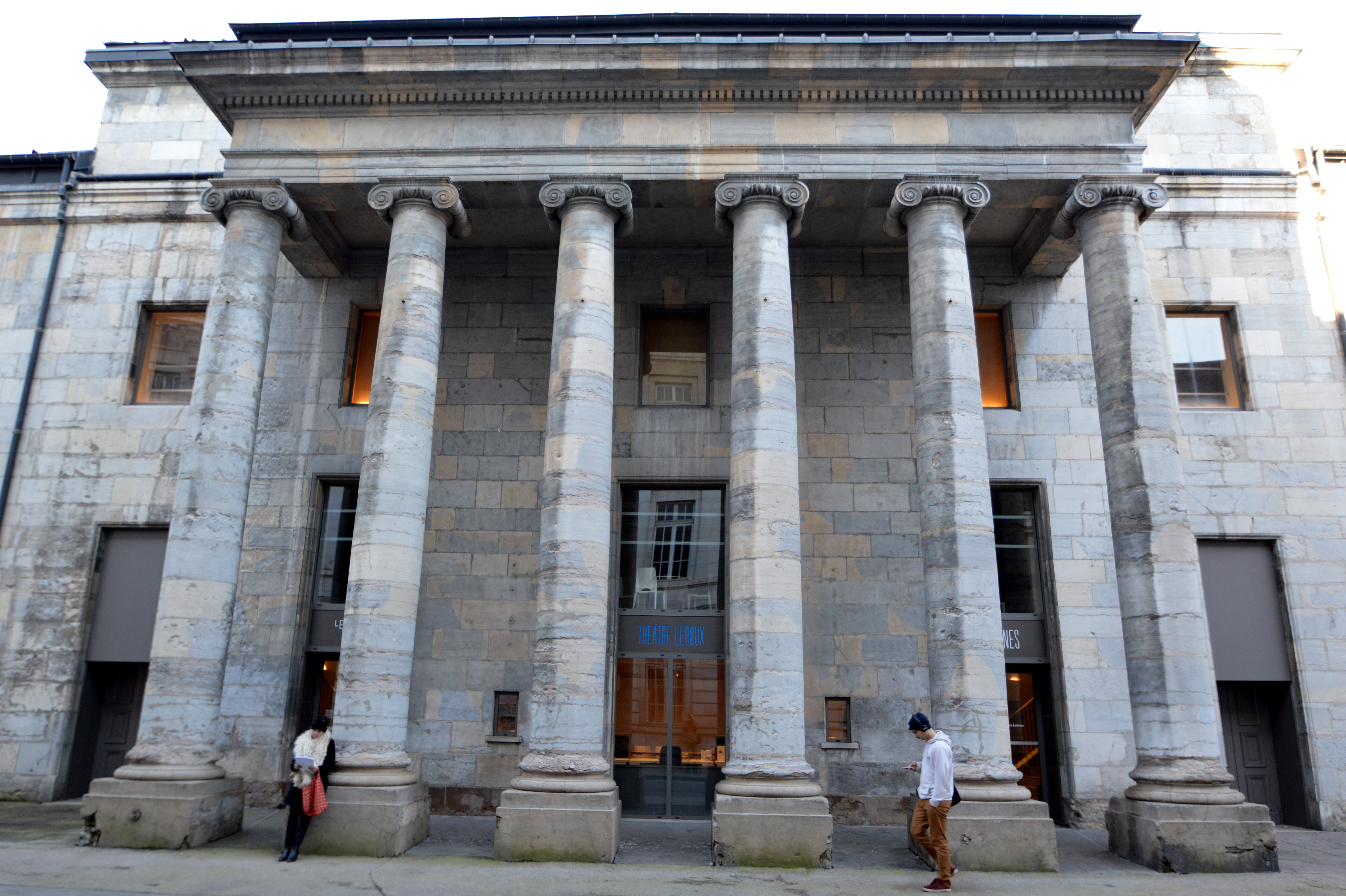 Façade principale du théâtre municipal de Besançon construit par Claude-Nicolas-Ledoux.